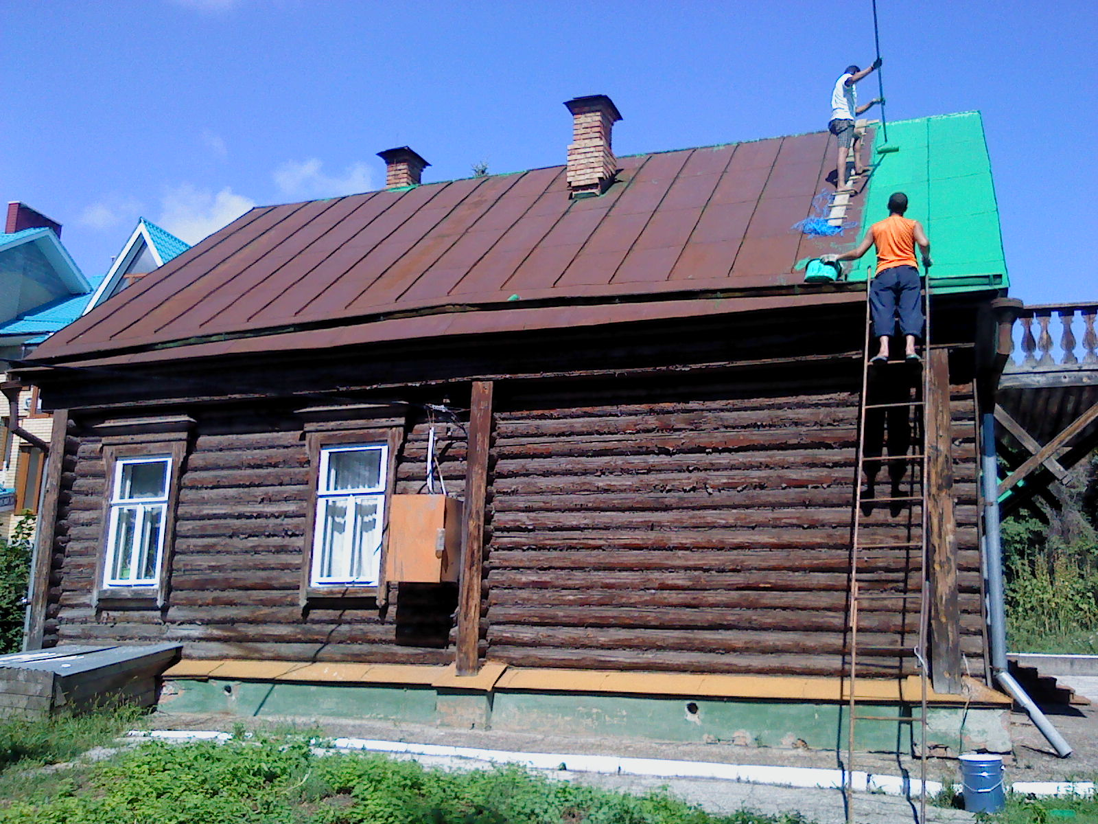 Идёт ремонт музея "Конспиративная квартира симбирской группы РСДРП", 11 августа 2012 г.